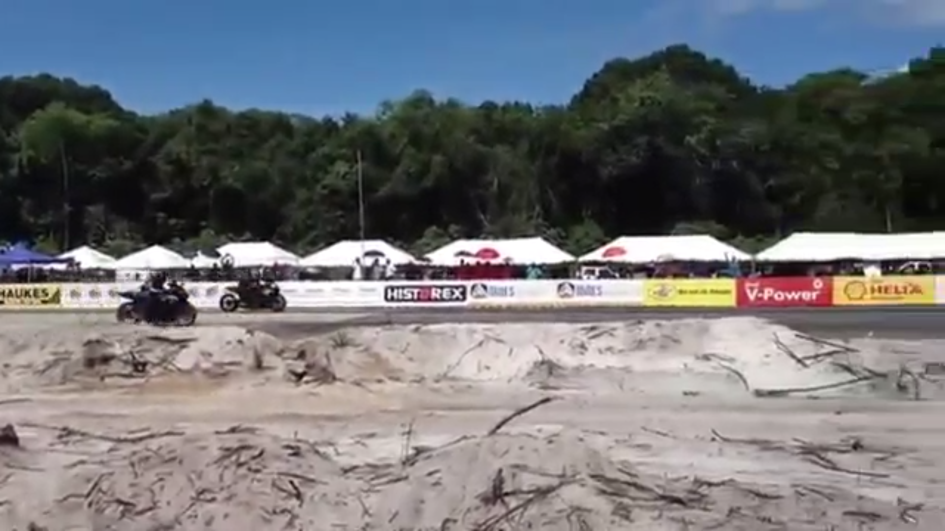 Motosur Dragrace Suzuki